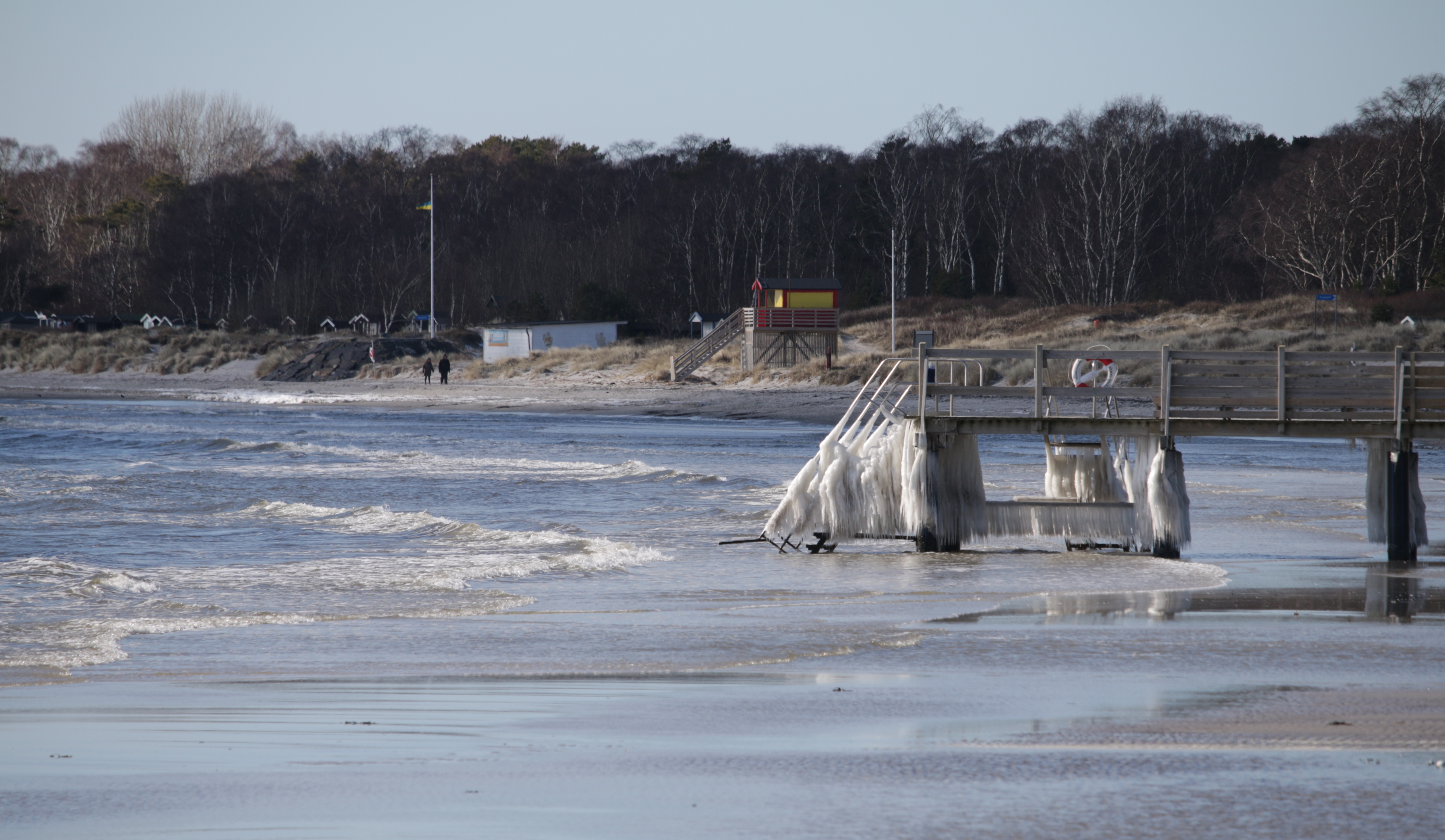 Stranden i Kämpinge